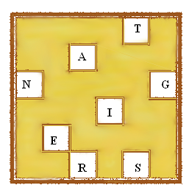 Esempio di Griglia di Cardano con 8 aperture per singole lettere